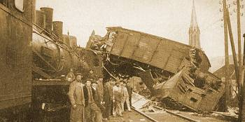 Beim Eisenbahnunfall in Weidenthal 1902 starb ein Mensch, weitere wurden verletzt.